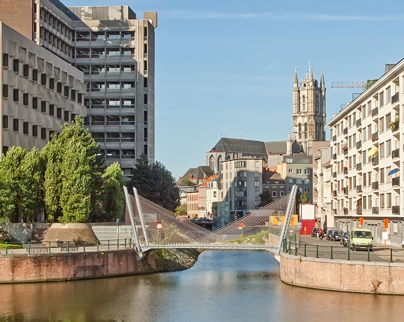 Bavobrug